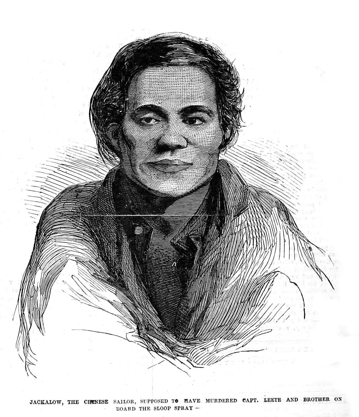 Jackalow